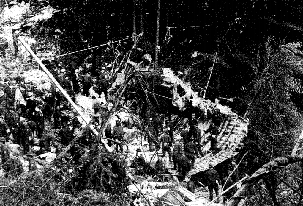 日本航空123便の残骸 JTSB公表の報告書より（62-2-JA8119 日本航空(株)所属 ボーイング 747SR-100型 JA8119 群馬県多野郡上野村）